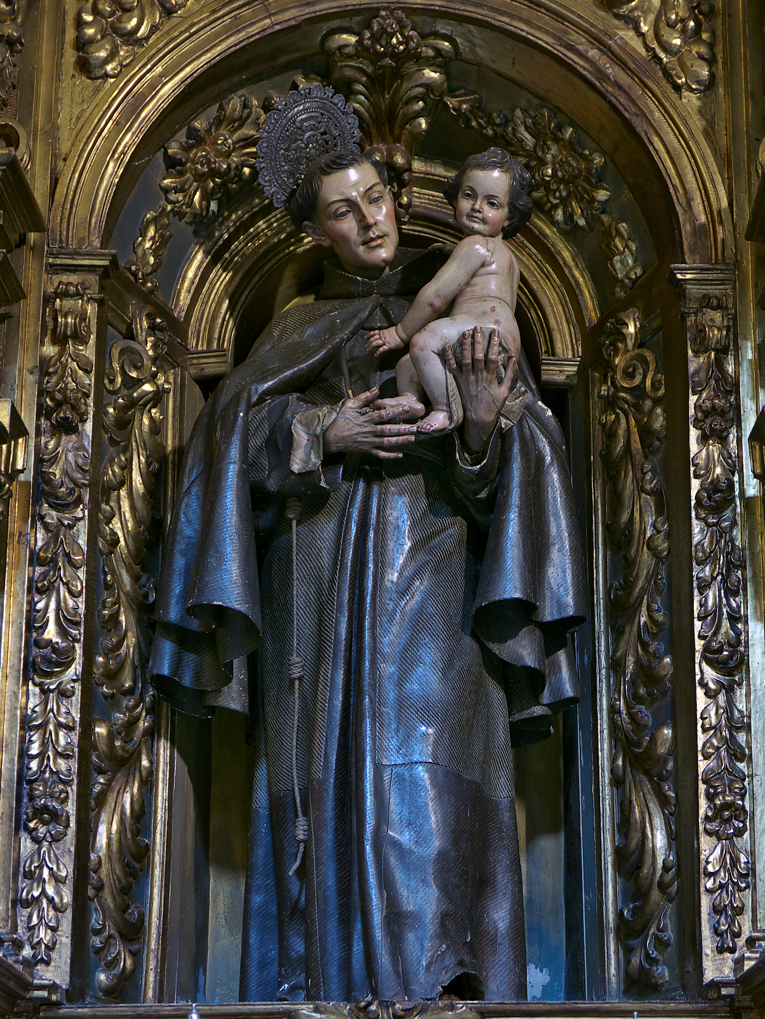 Basílica de Nuestra Señora de las Angustias (Granada). Magnífica imagen de José de Mora, datable entre 1697 y 1703, procedente del Monasterio de San Antonio y San Diego, Granada.